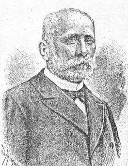 Trajan Doda, General und Politiker